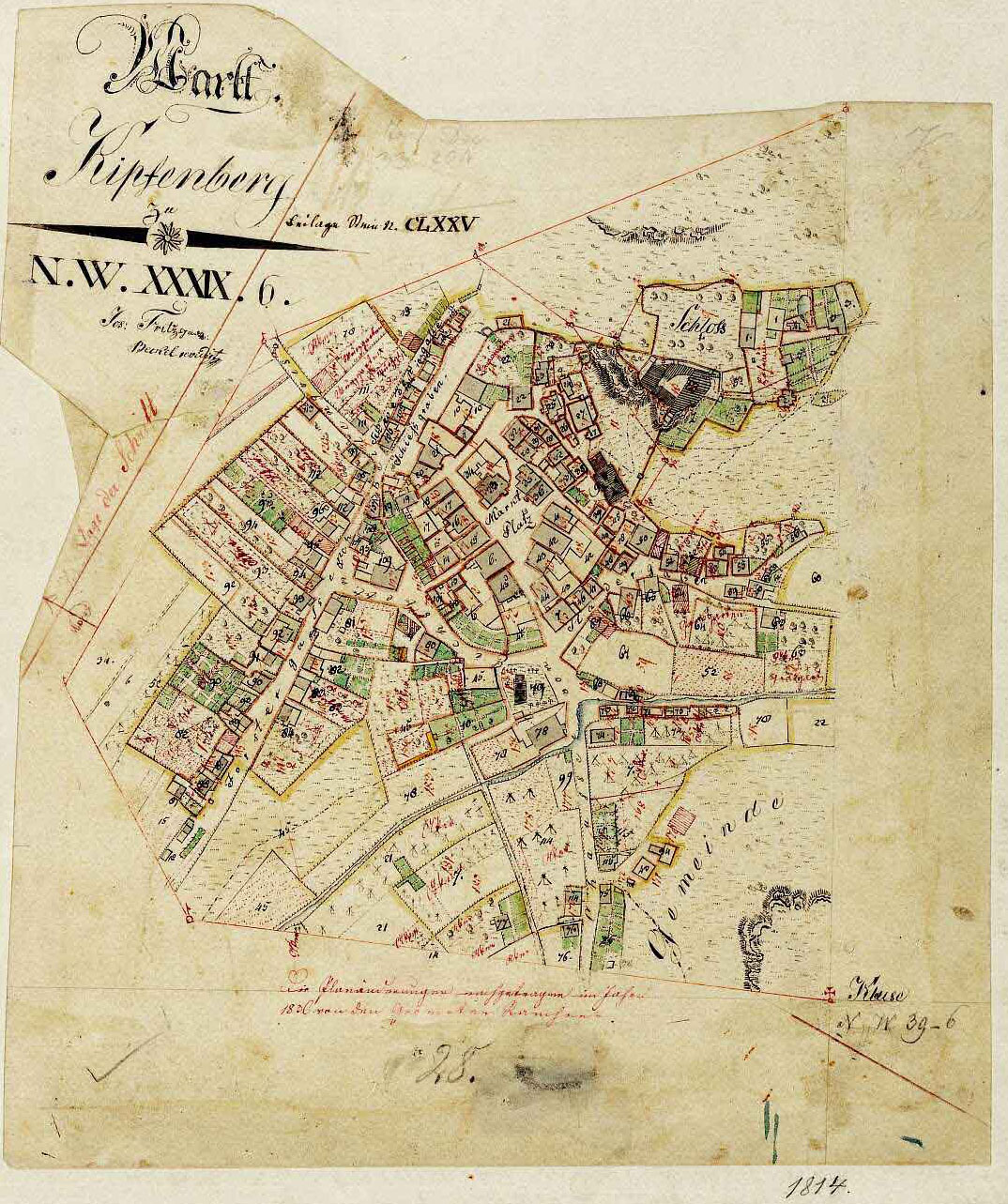 Historische Ortskarte von Kipfenberg von 1814. Maßstab: 1:2500.